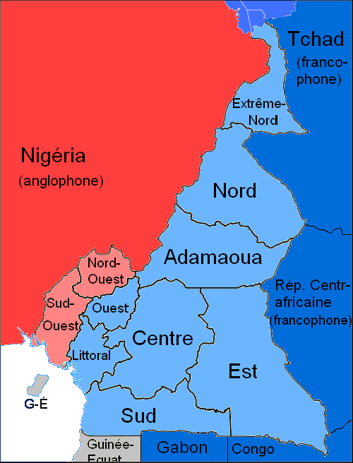 Les deux langues officielles du Cameroun sont le français et l'anglais. La majorité des régions camerounaises sont francophones. La Guinée Équatoriale est un pays à la fois hispanophone et francophone. Les autres pays voisins sont soit anglophones (Nigéria) ou francophones (le reste). Il y a également un grand nombre de langues indigènes.